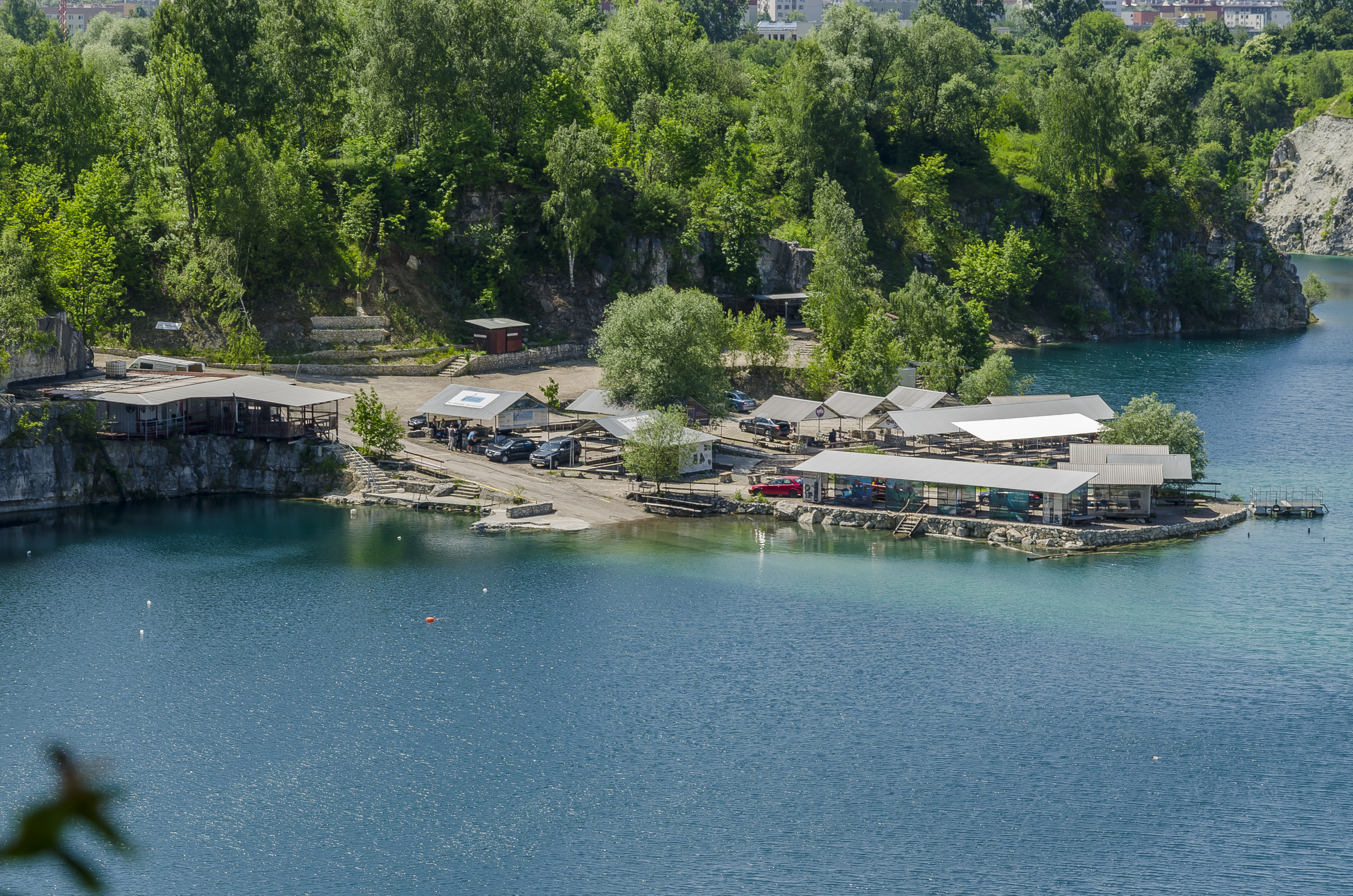 Zakrzówek, Kraków, Poland